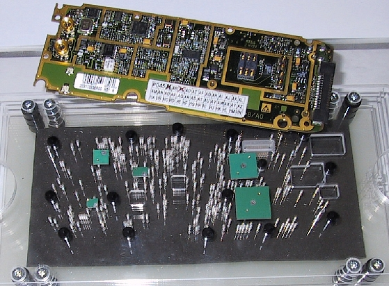 Foto von einem Vakuumadapter mit Starrnadeln